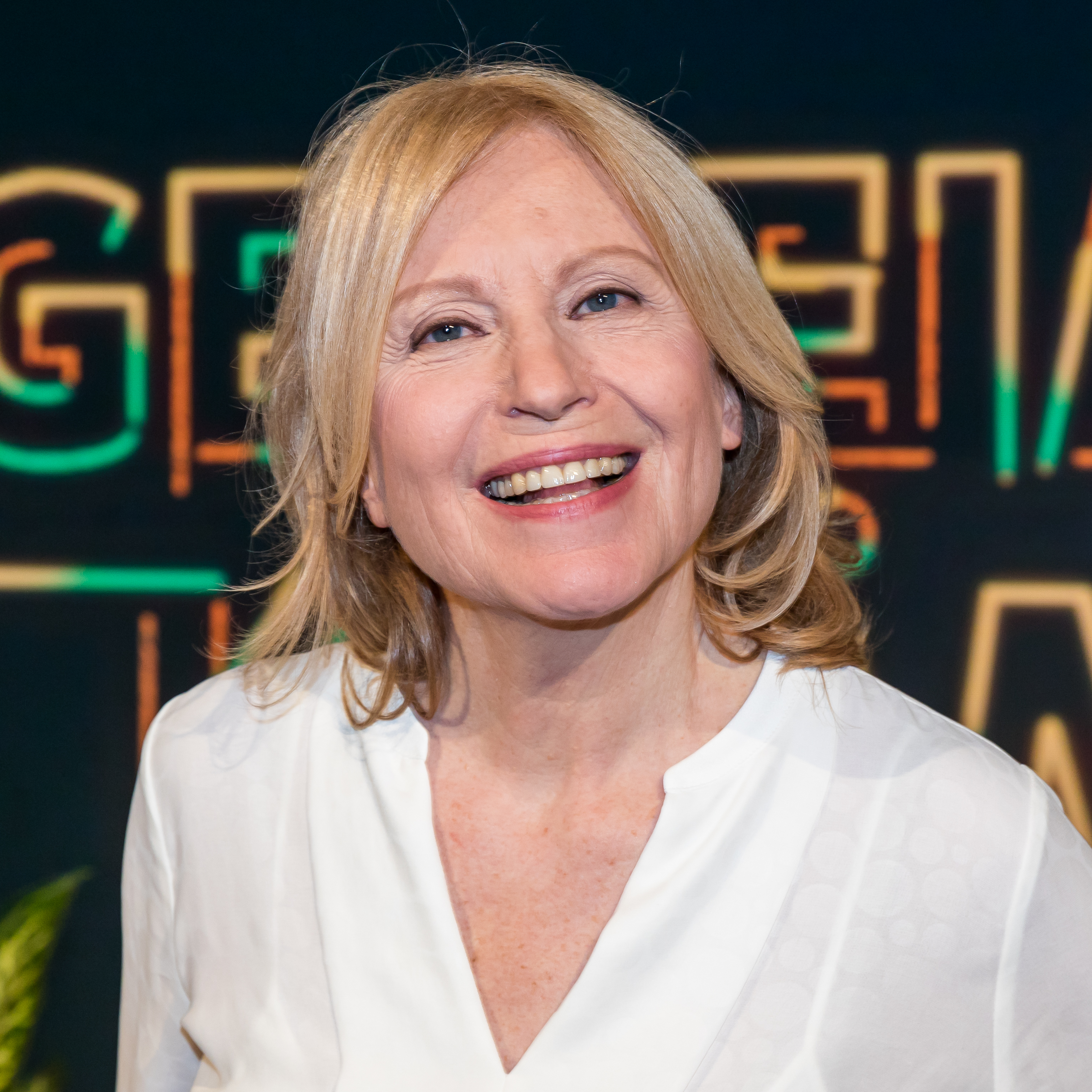 „Geheimniskrämer“ mit Martin Klempnow und seinen Gästen. Aufzeichnung des Westdeutschen Rundfunks im Studio Köln-Bocklemünd vom 26. Januar 2018 Foto: Maren Kroymann